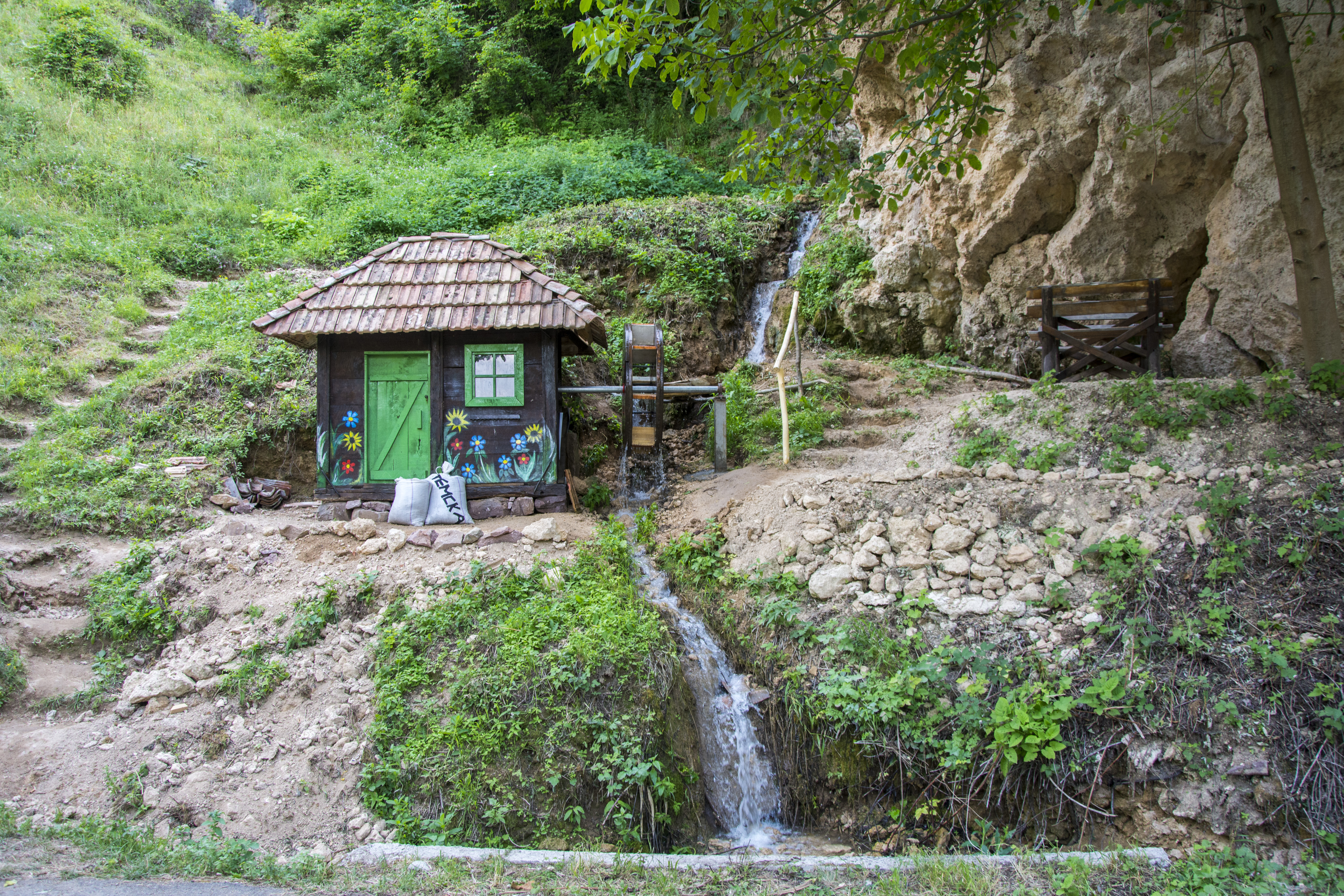 Vodenca u blizini manastira Temska